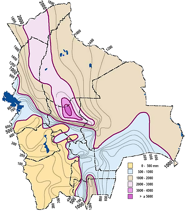 Mapa las precipitaciones en Bolivia.